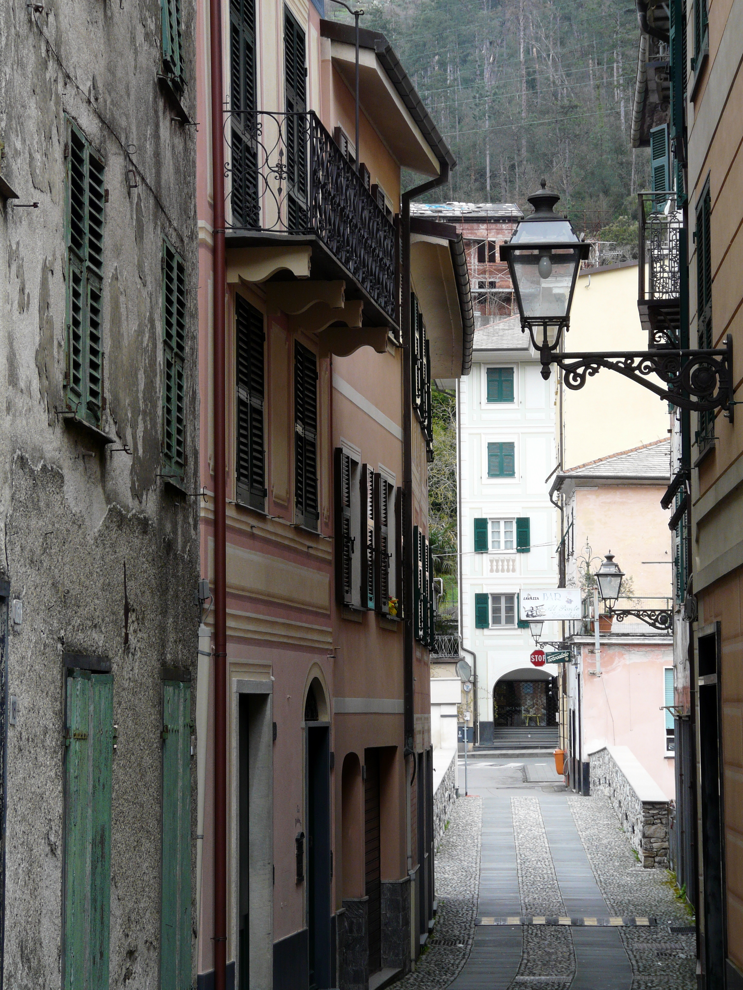 Centro storico di Cicagna, Liguria, Italia